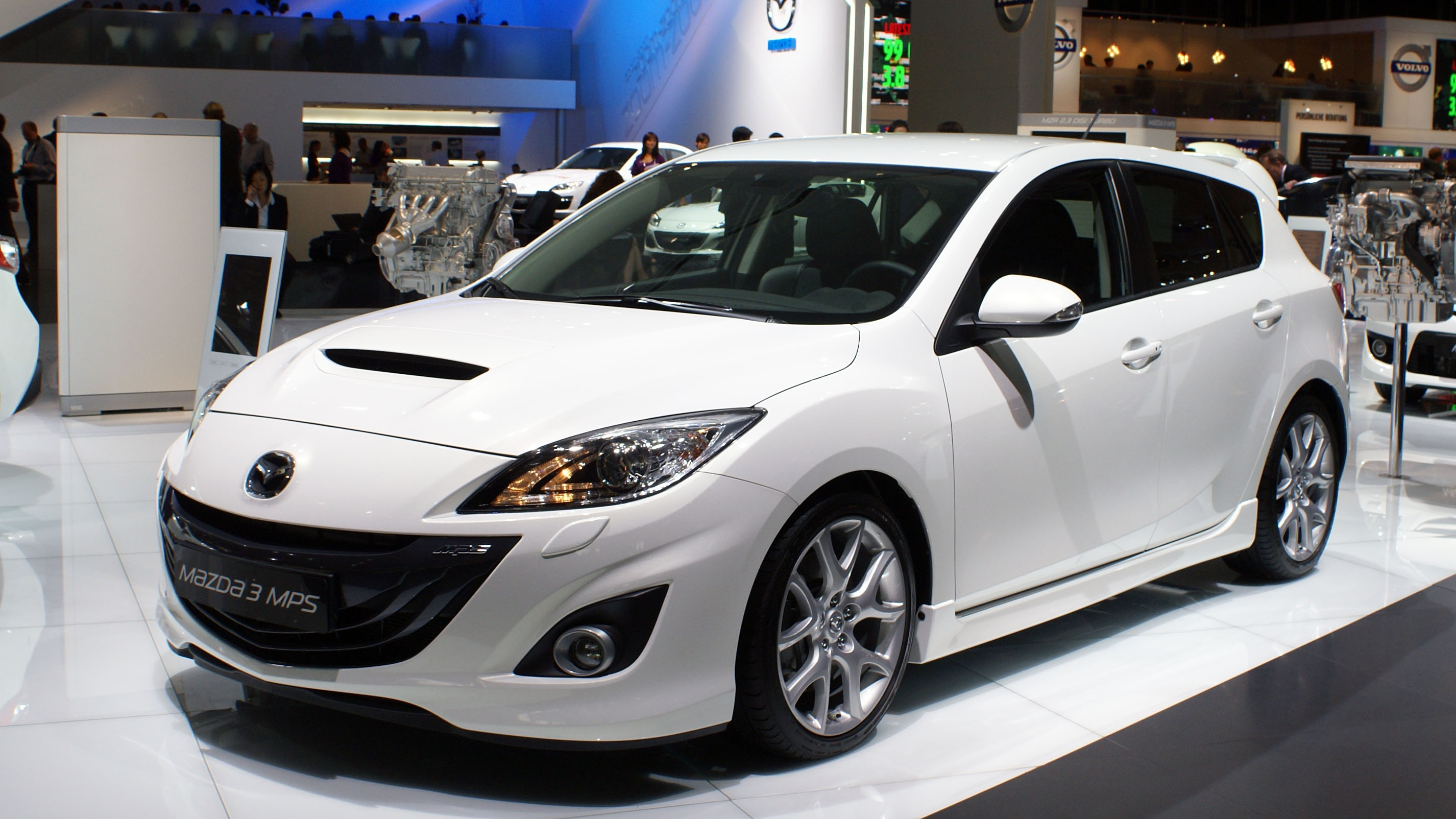 Mazda 3 MPS